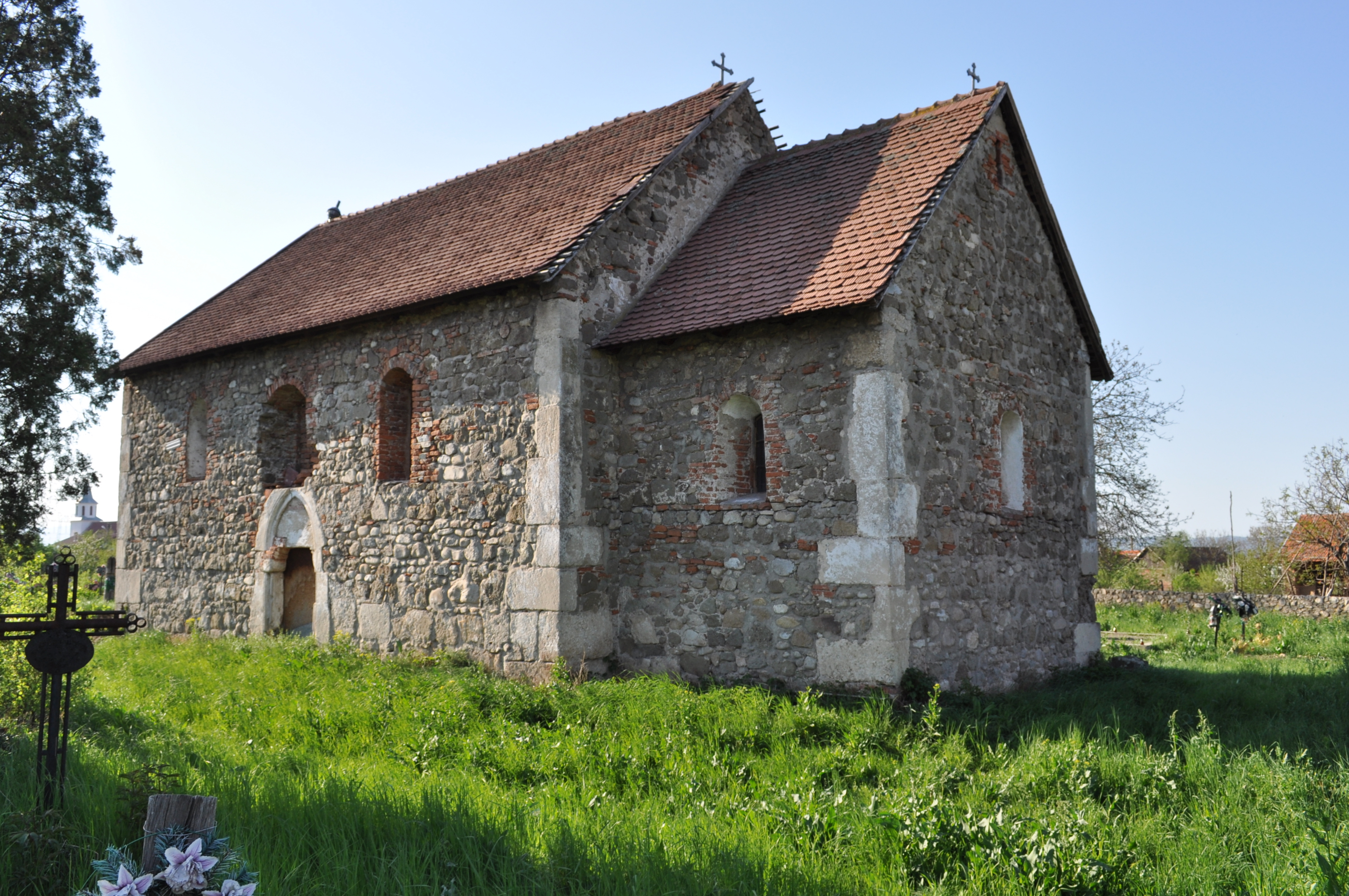 Biserica "Sf. Mare Mucenic Gheorghe", sat SÂNPETRU; comuna SÂNTĂMĂRIA-ORLEA